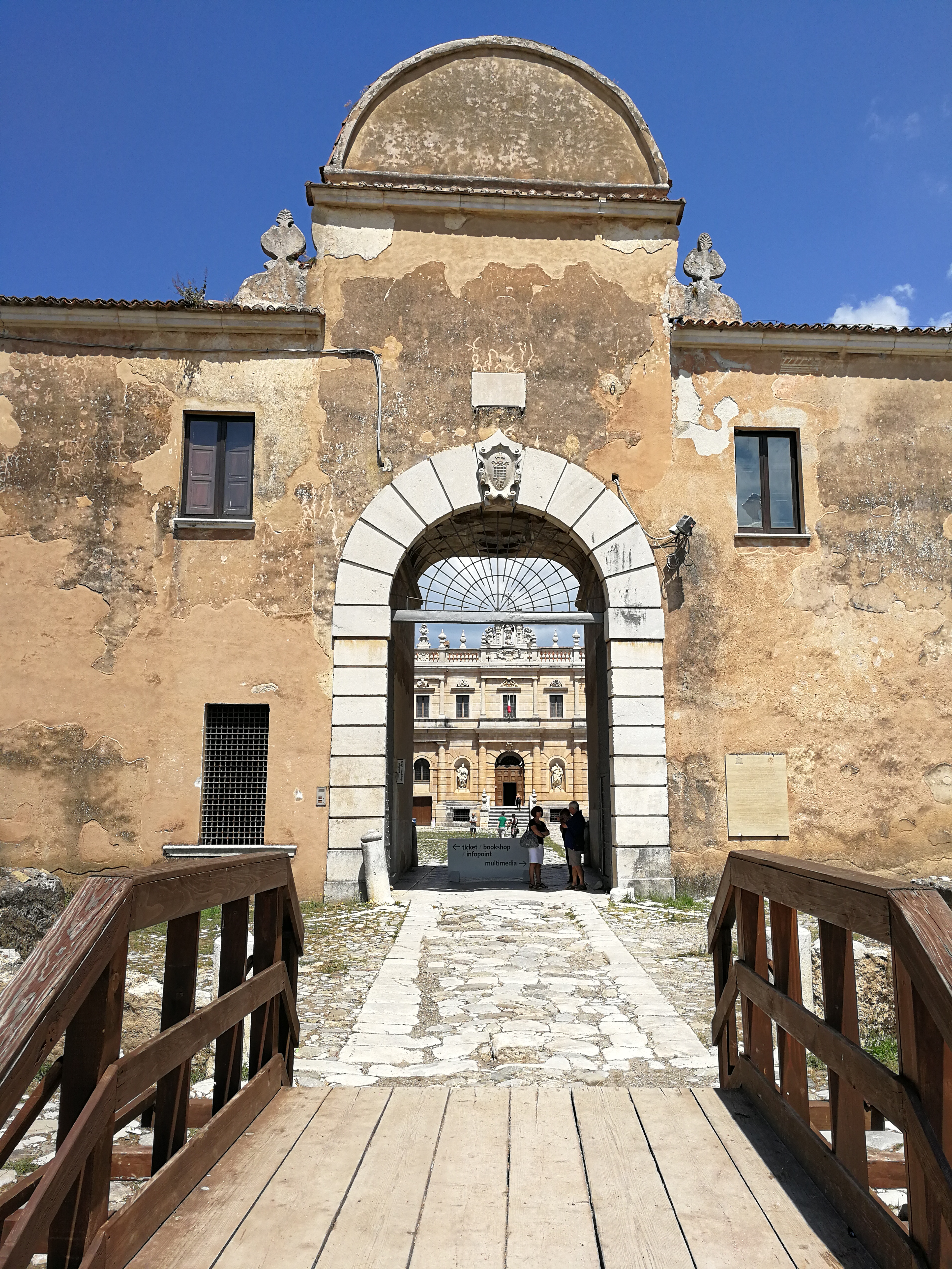 certosa di Padula This is a photo of a monument which is part of cultural heritage of Italy.